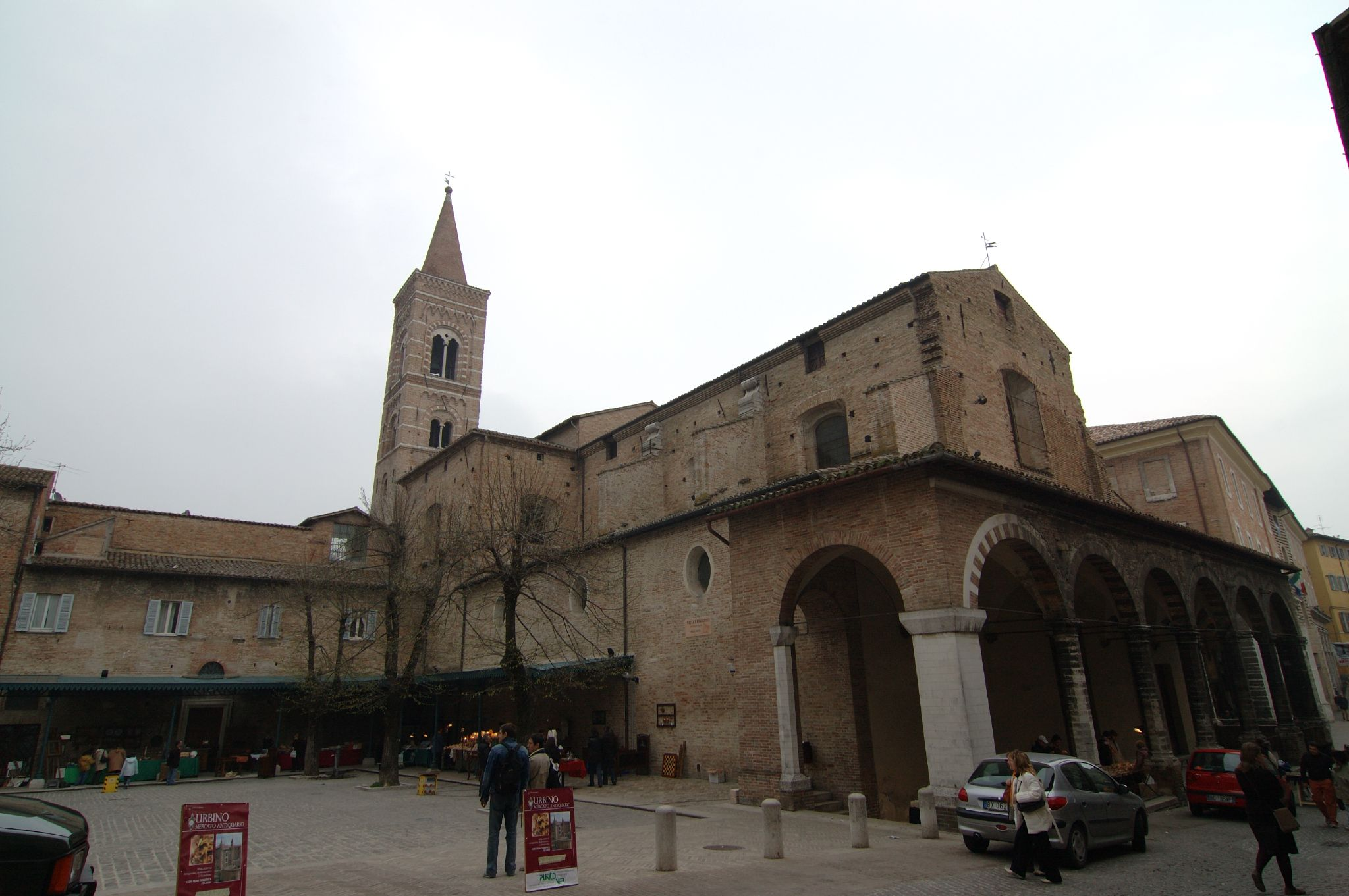 Urbino, Marche, Italia